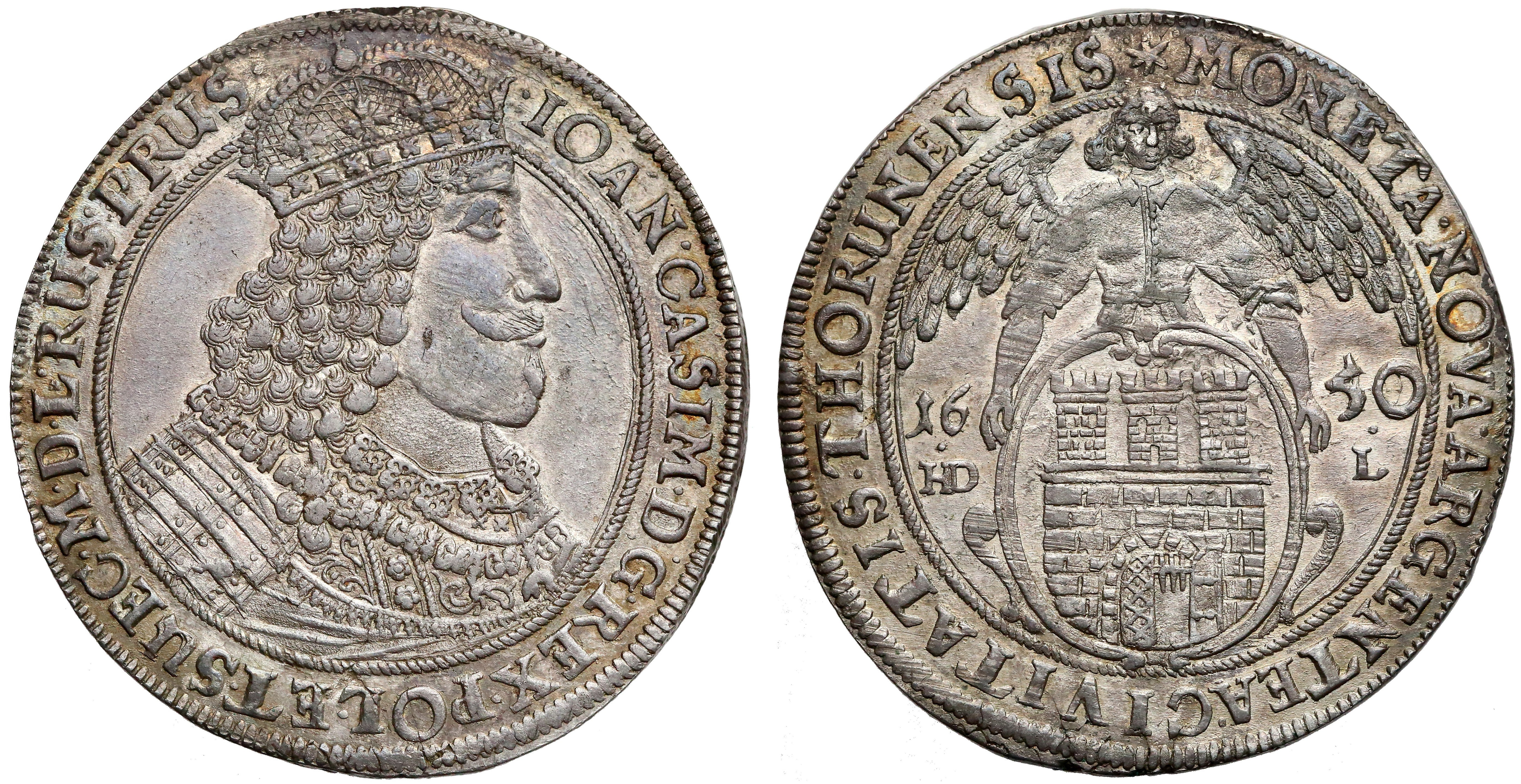 Talar miejski Toruń 1650